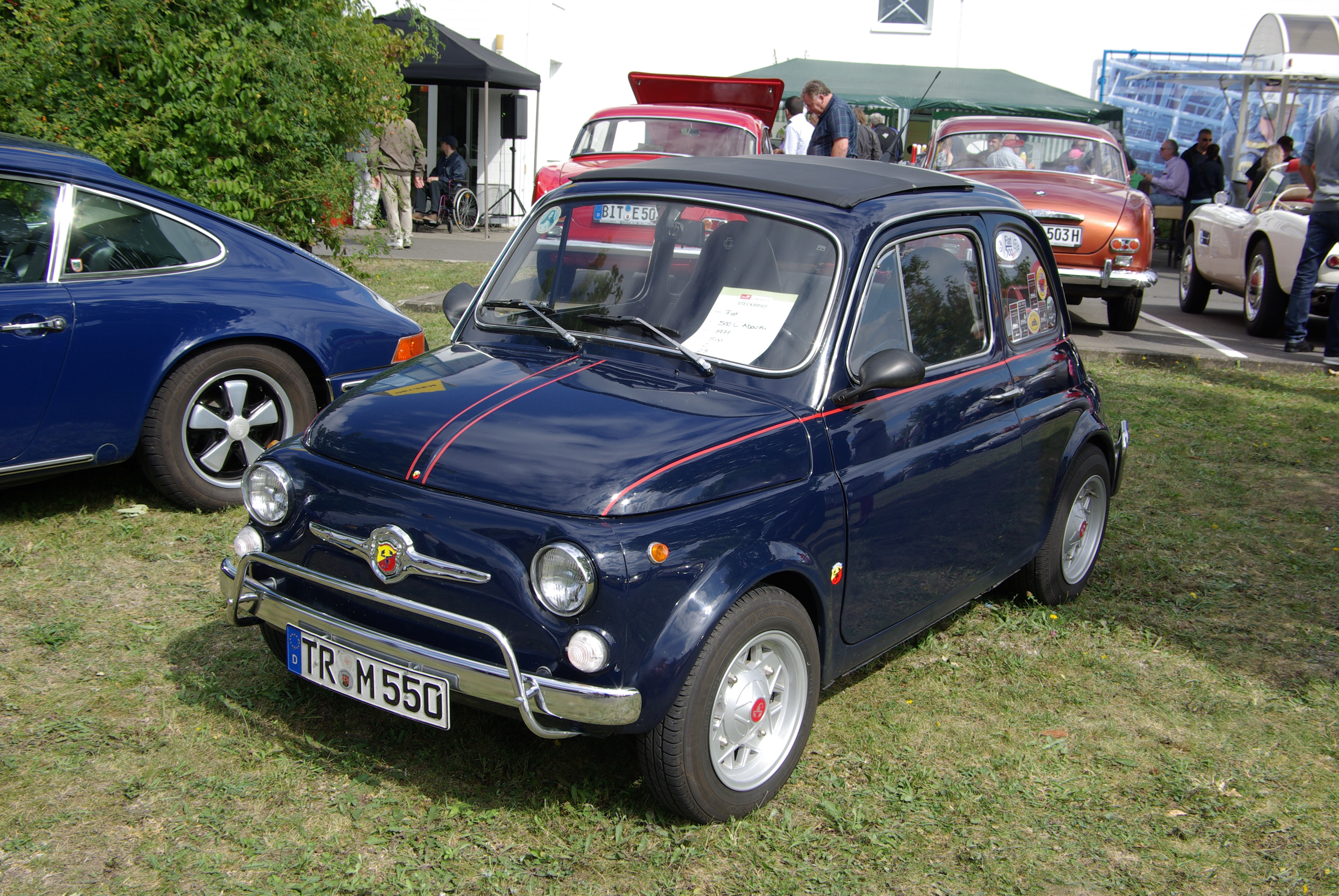 Fiat 500 Abarth, Baujahr 1971, 500 cm³, 2 Zyl., 23 PS, Bitburg Classic 2012